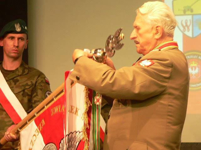 Generał Andrzej Selega dekoruje sztandar ZS"S" RP przyznanym związkowi odznaczeniem - Krzyżem Komandorskim "Weteranom WOP, funkcjonariuszom rezerwy Straży Granicznej i ich sympatykom